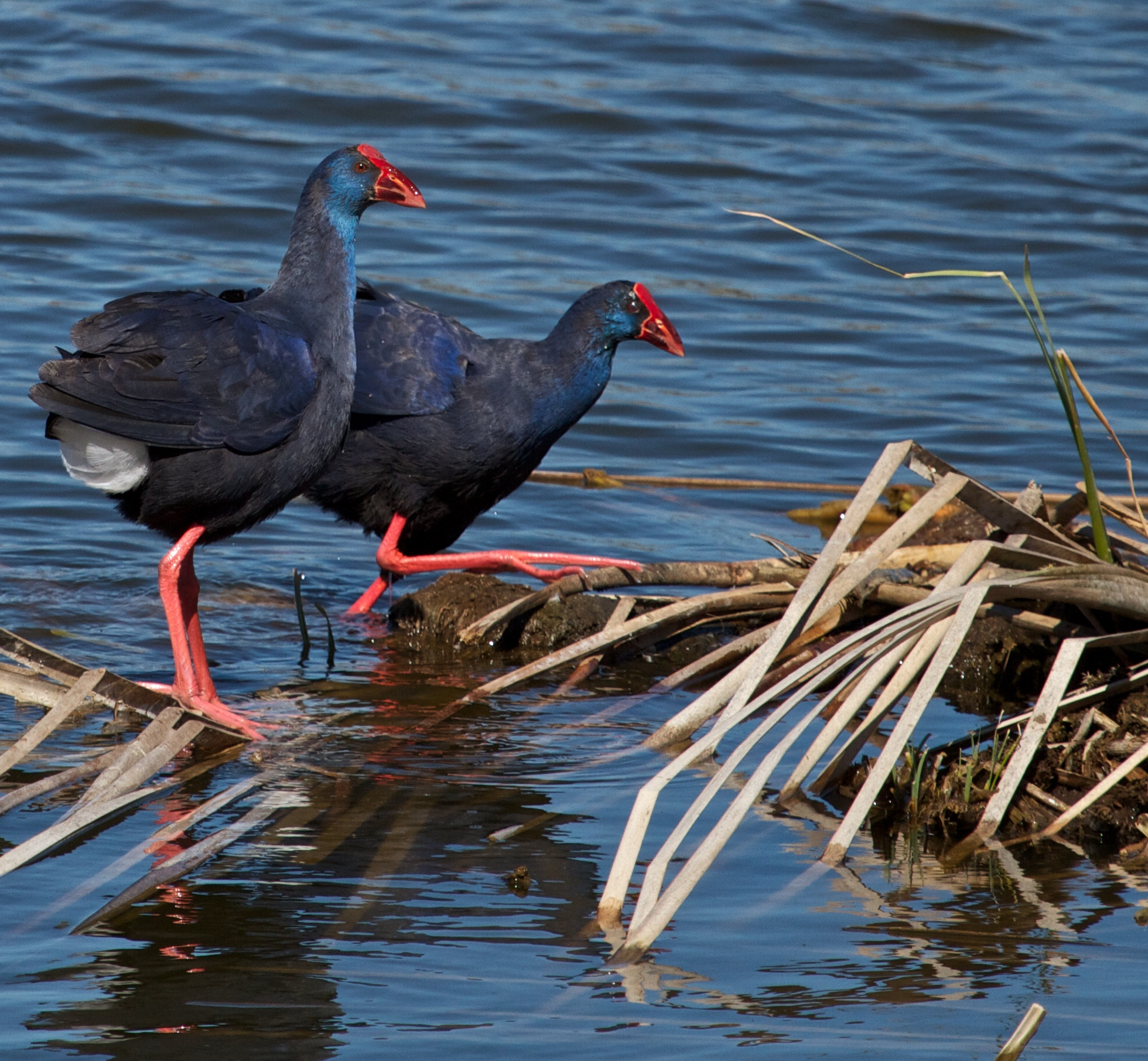 Porphyrio porphyrio, Pêra, Algarve, Portugal